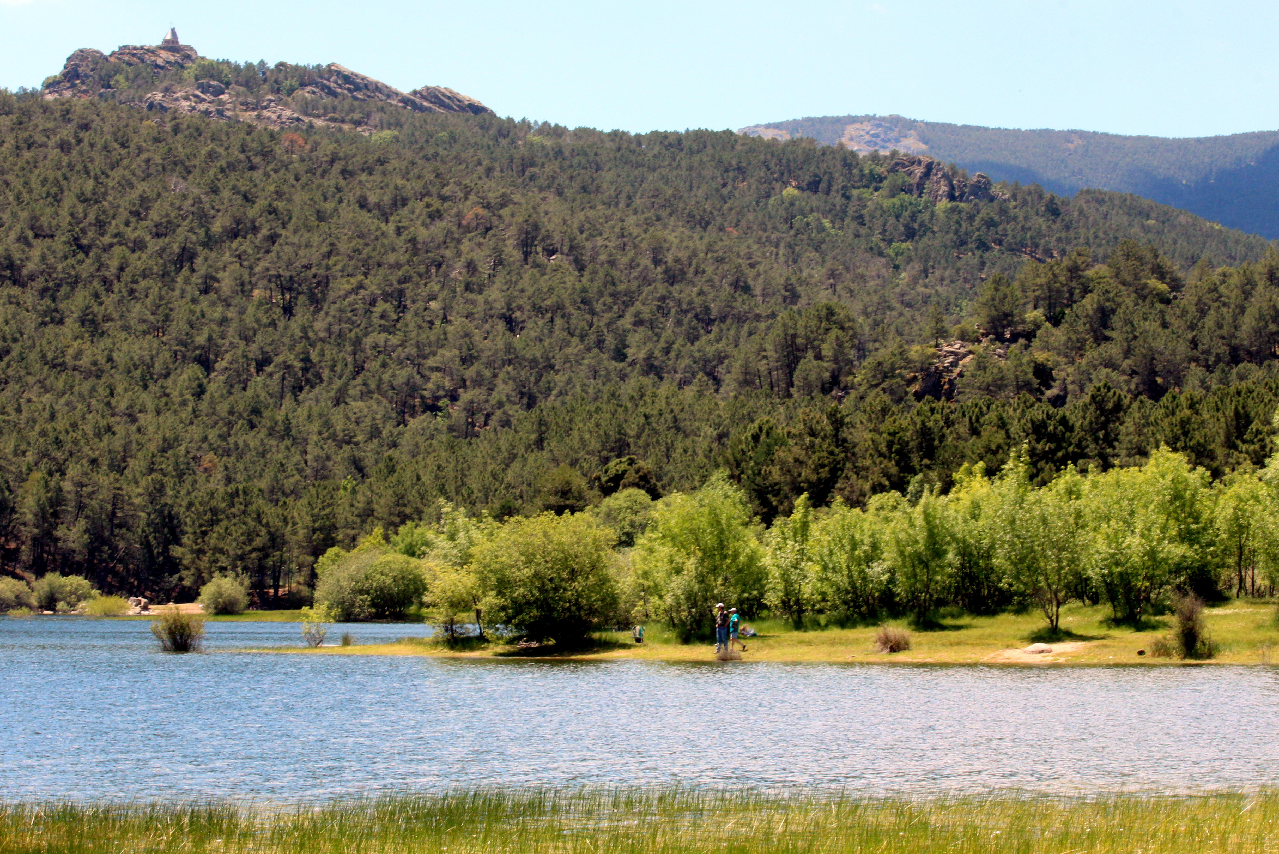 La Jarosa de Guadarrama